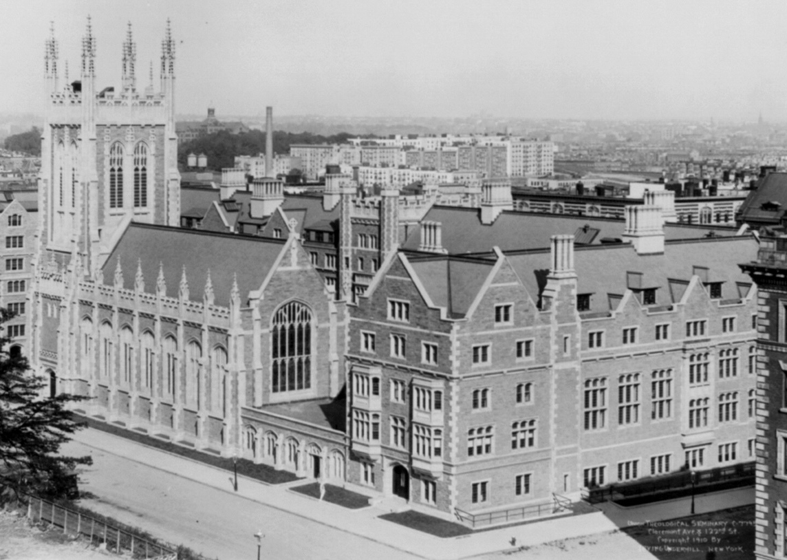 Union Theological Seminar New York